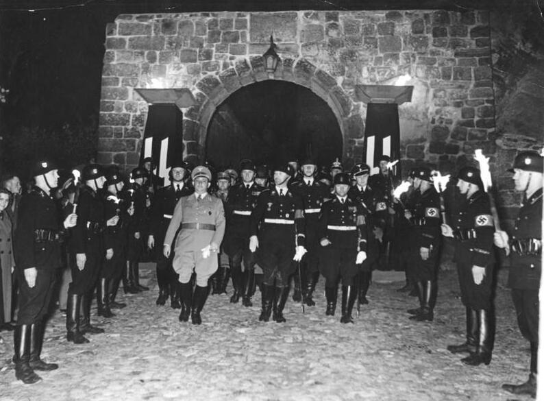 Heinrichsfeier in Quedlinburg Anlässlich des Todestages von König Heinrich I. fand am 1. Juli wie in den Vorjahren, eine nächtliche Feierstunde statt. UBz: Reichsführer SS Himmler verlässt in Begleitung von Gauleiter und Reichsstatthalter Jordan (links) und SS Obergruppenführer Heissmeyer (rechts) nach der Feierstunde durch das Spalier der SS-Fackelträger den Dom. Fot.:Ho 2.7.38